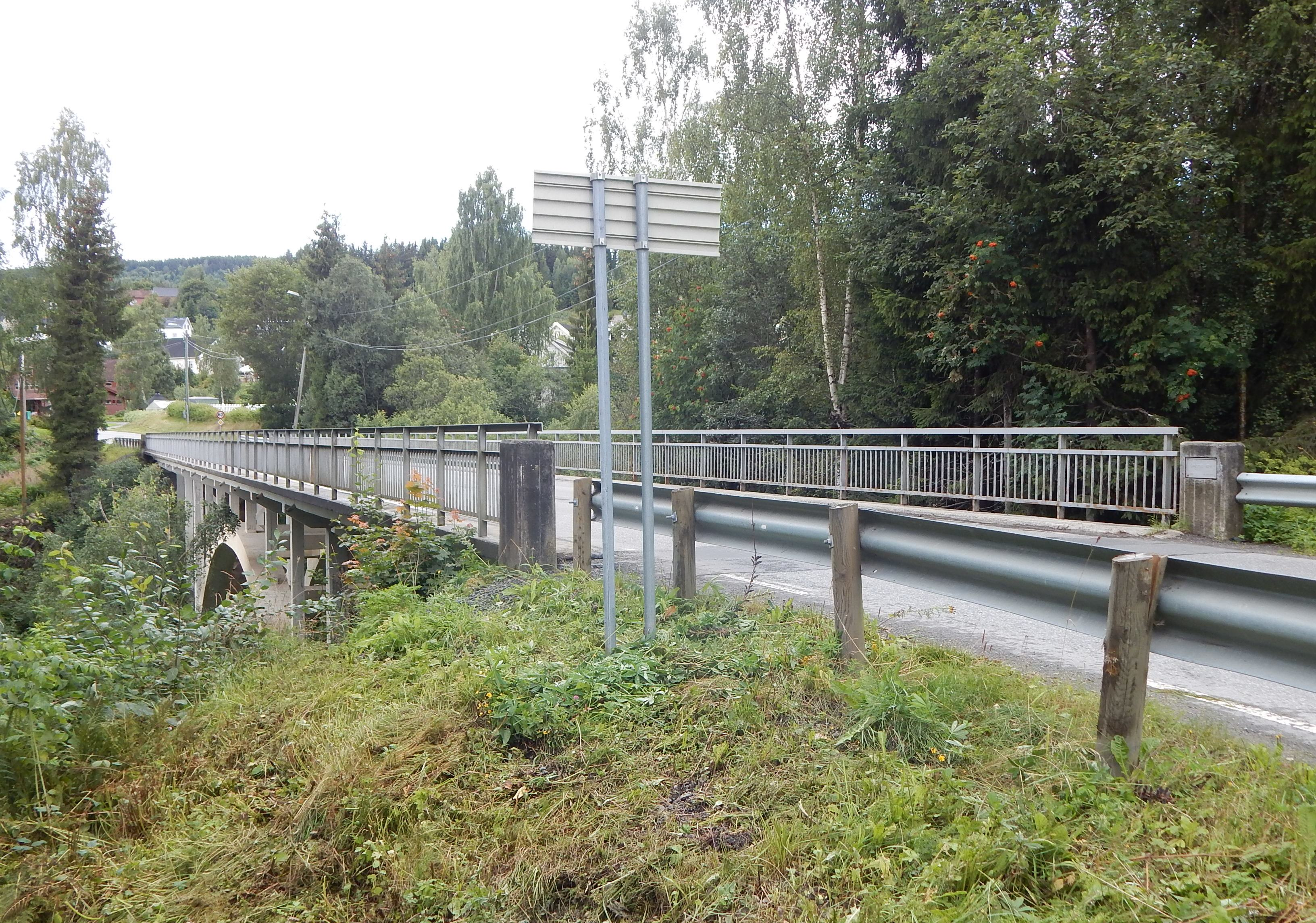 Bråstad bru med fylkesvei 172 over Bråstadelva